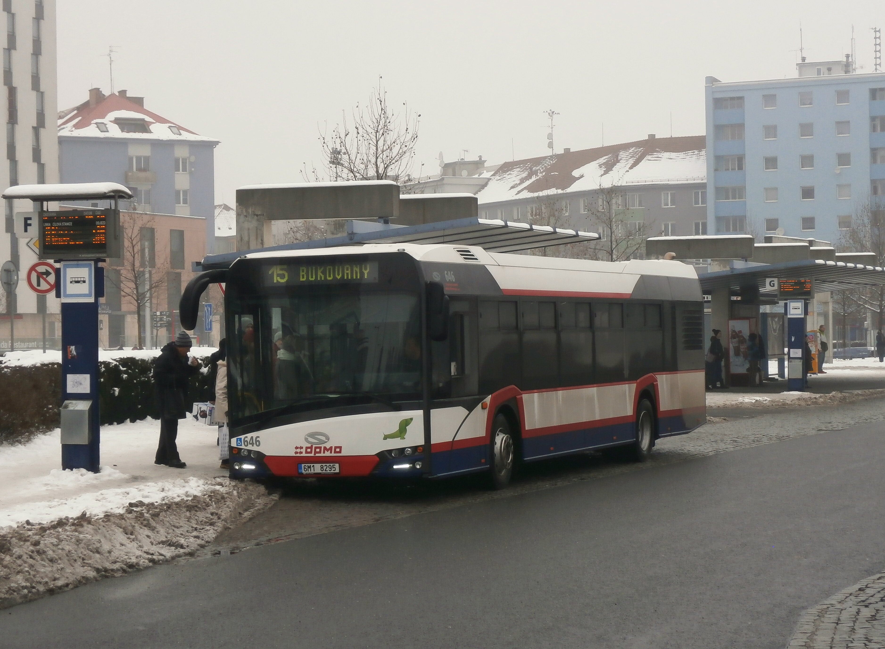 Solaris New Urbino 12, Olomouc